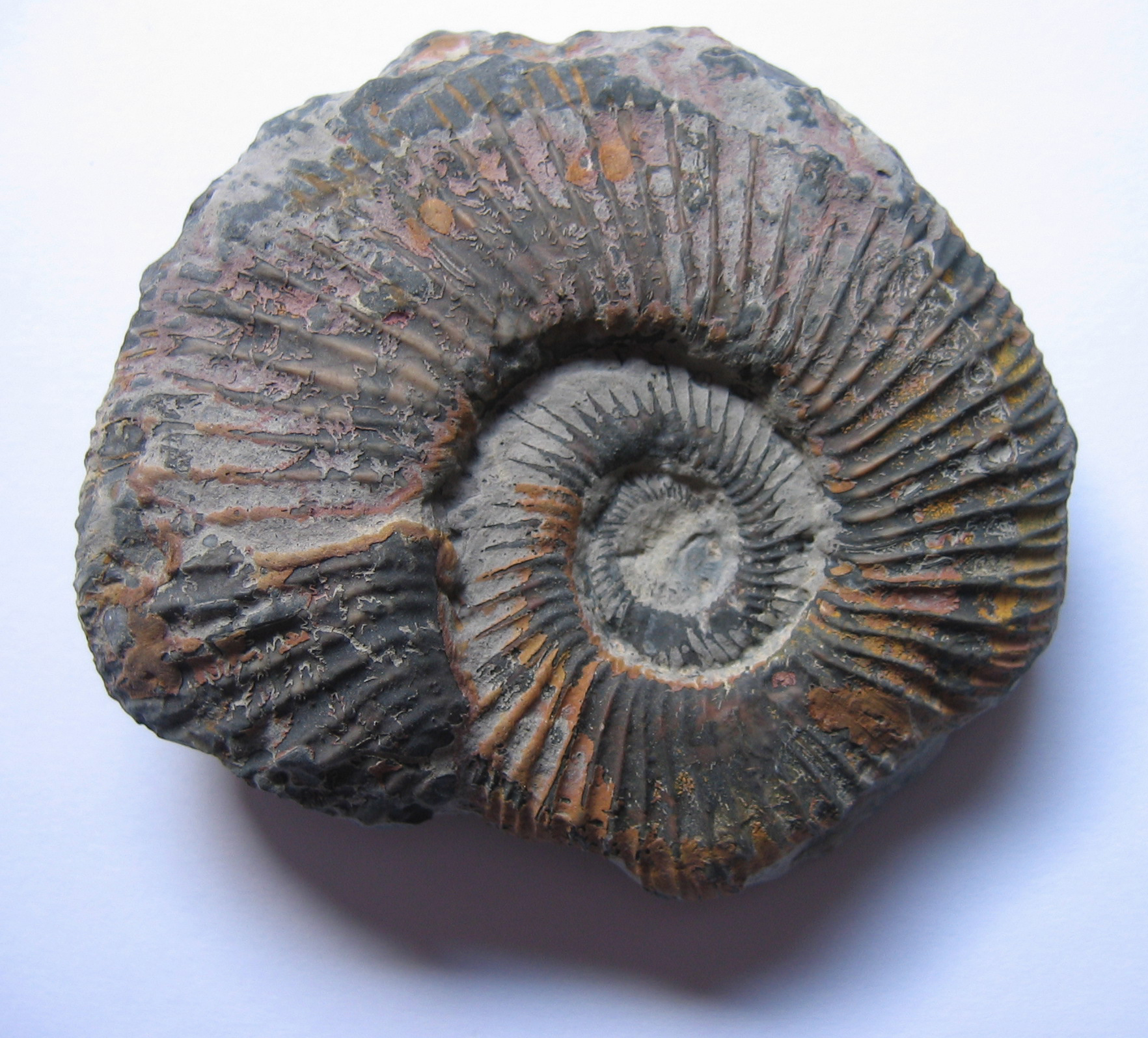 Liptonia jamesori